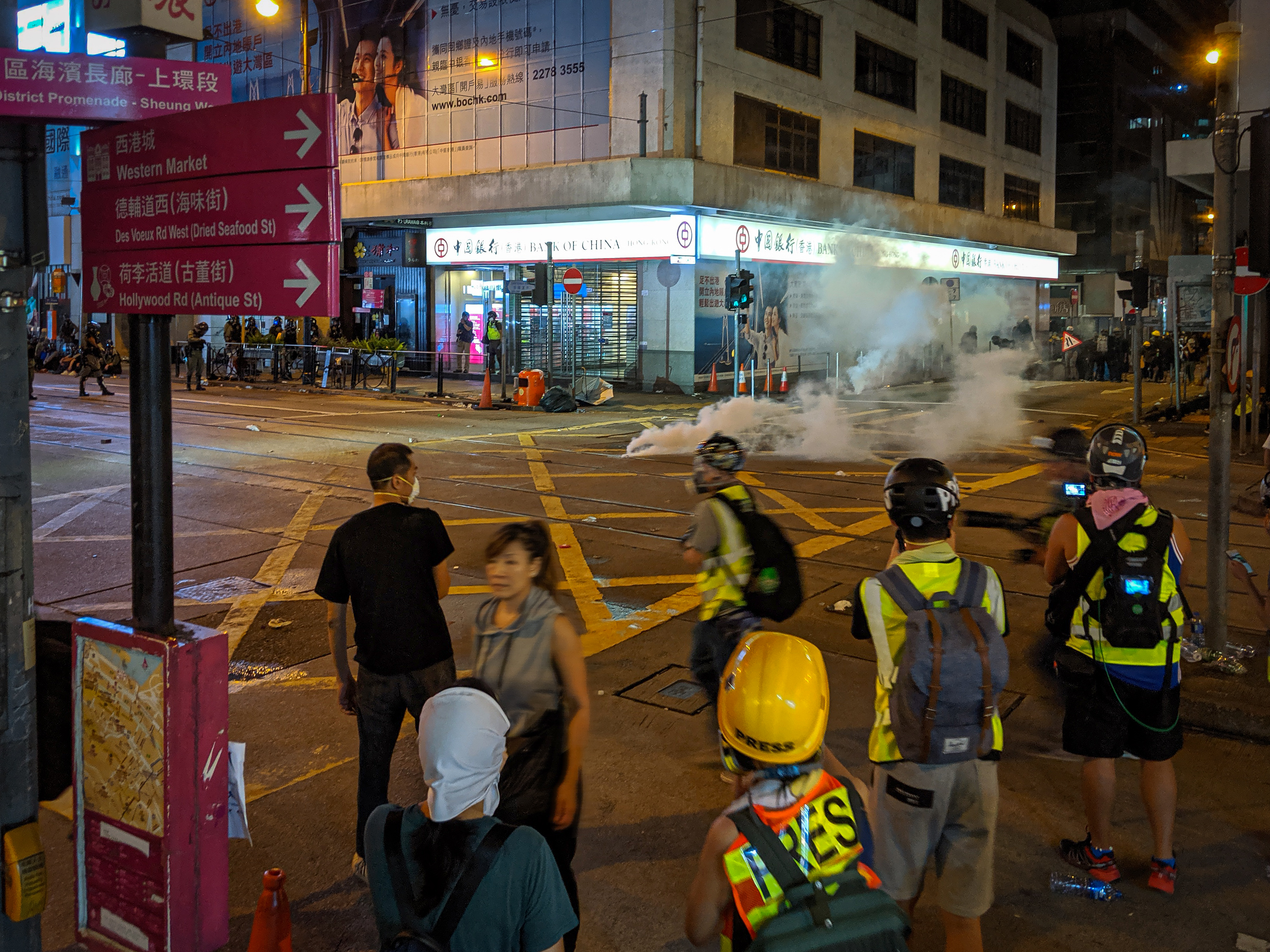 IMG_20190728_222602